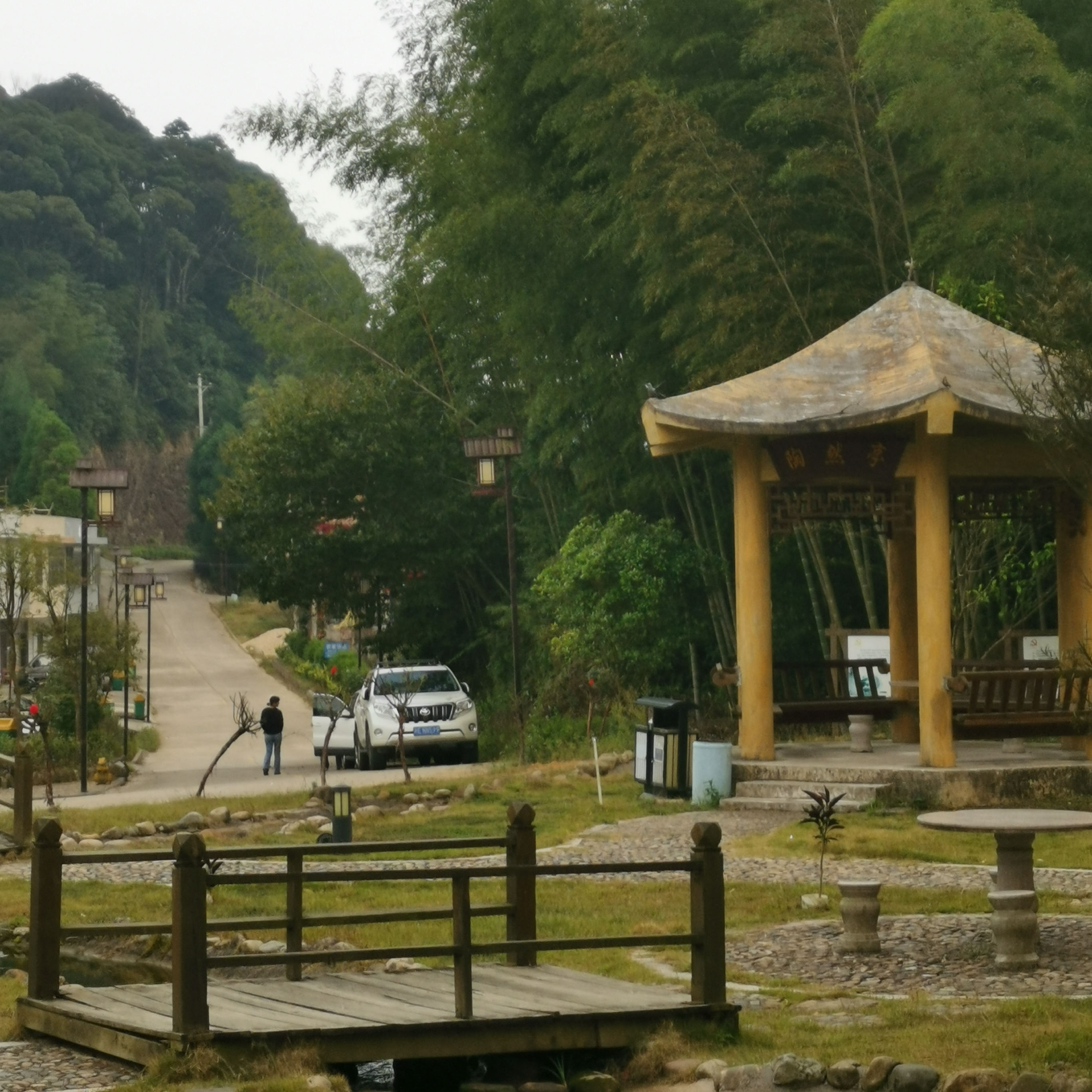 中文（中国大陆）: 贡鸭山村